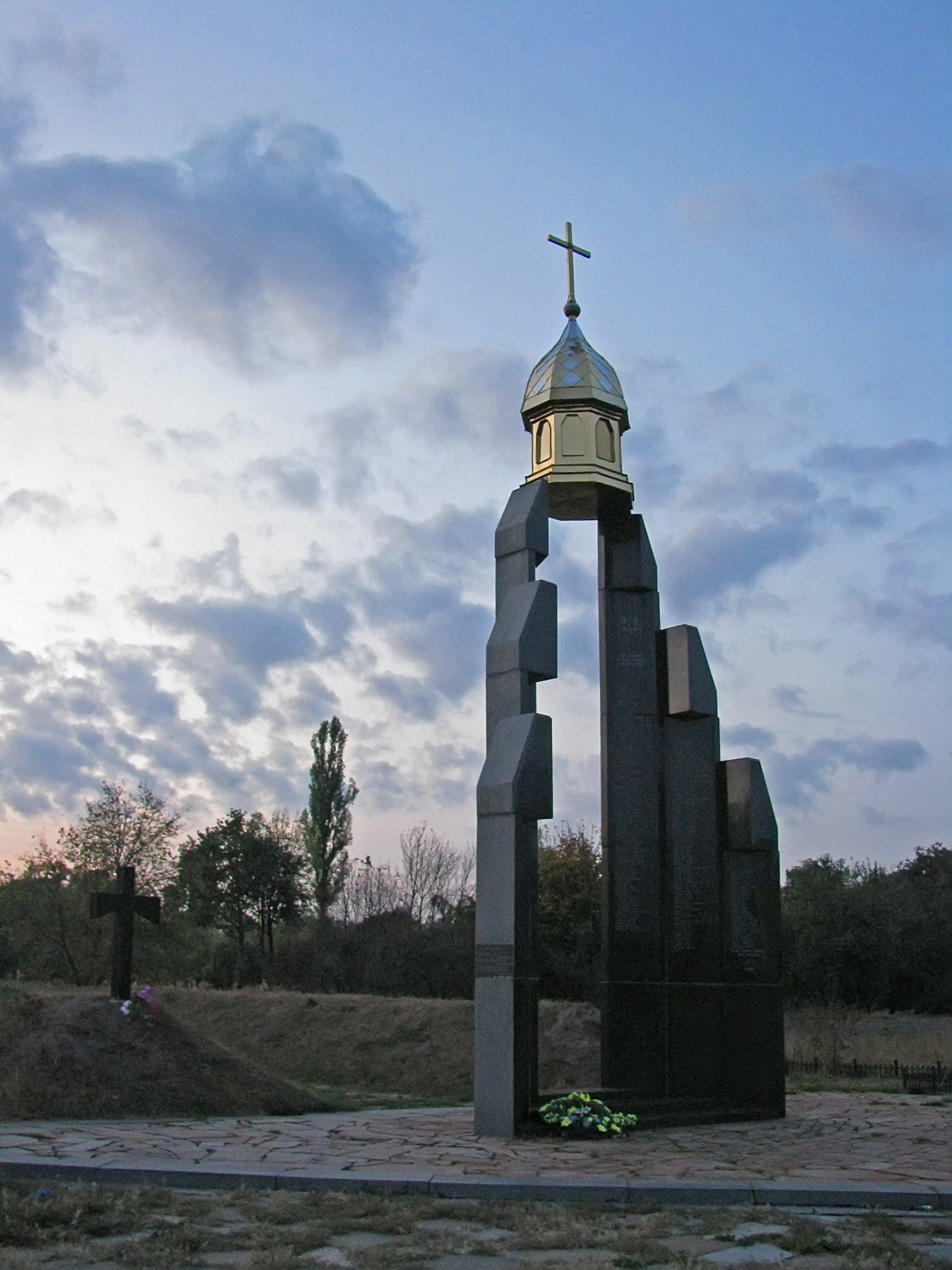 Братська могила воїнів II Зимового походу армії УНР, Народицький район, с. Базар, вул. Радянська